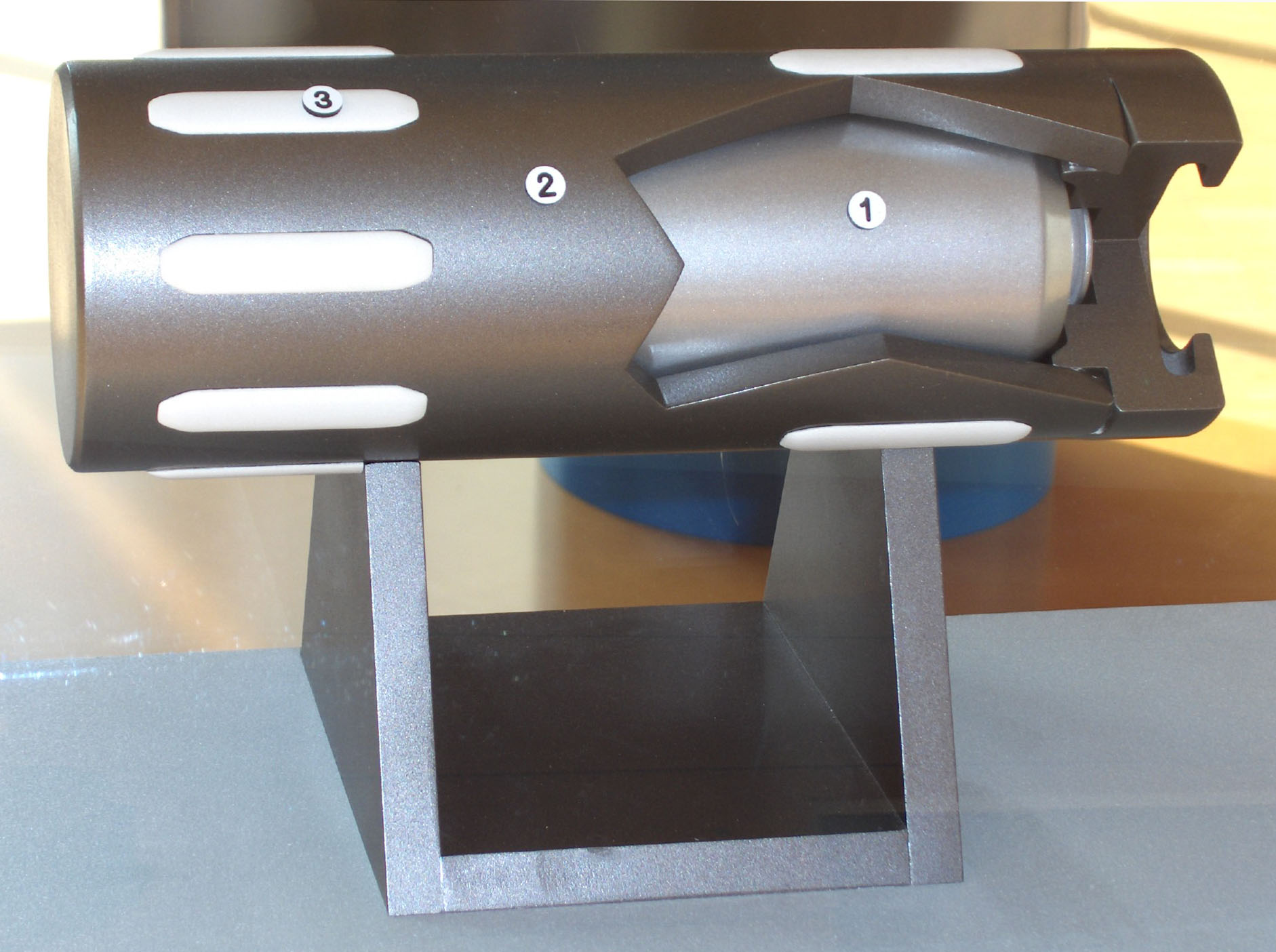 Représentation d'un conteneur de stockage au Laboratoire de recherche souterrain de Meuse/Haute-Marne à Bure. Il est destiné aux colis de déchets de haute activité (déchets C). Légende : 1) Colis primaire en acier inoxydable 2) Colis de stockage en acier 3) Pain en céramique Son poids réel est d'environ 2 tonnes.